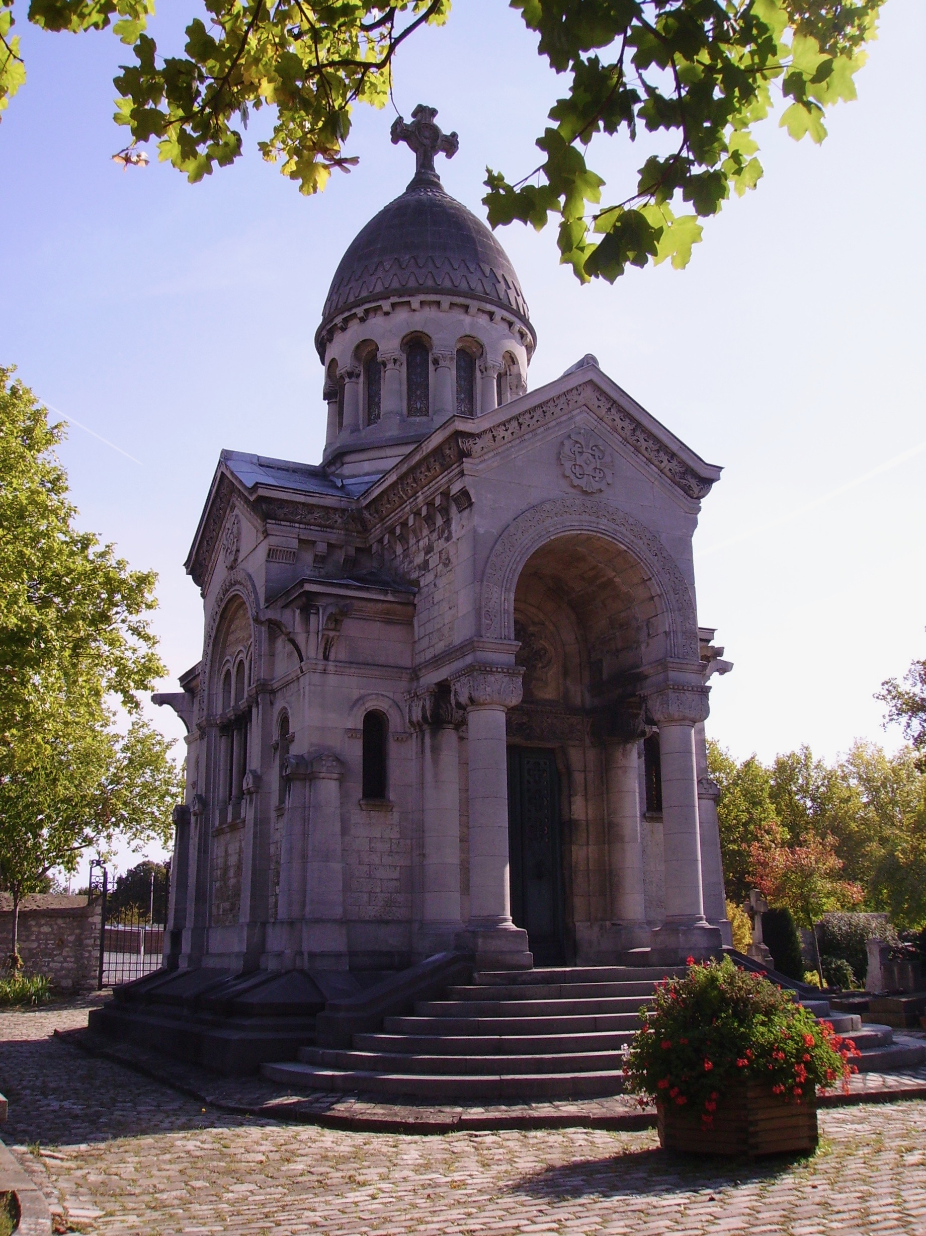 Chapelle funéraire de Jules Hunebelle au cimetière communal de Clamart